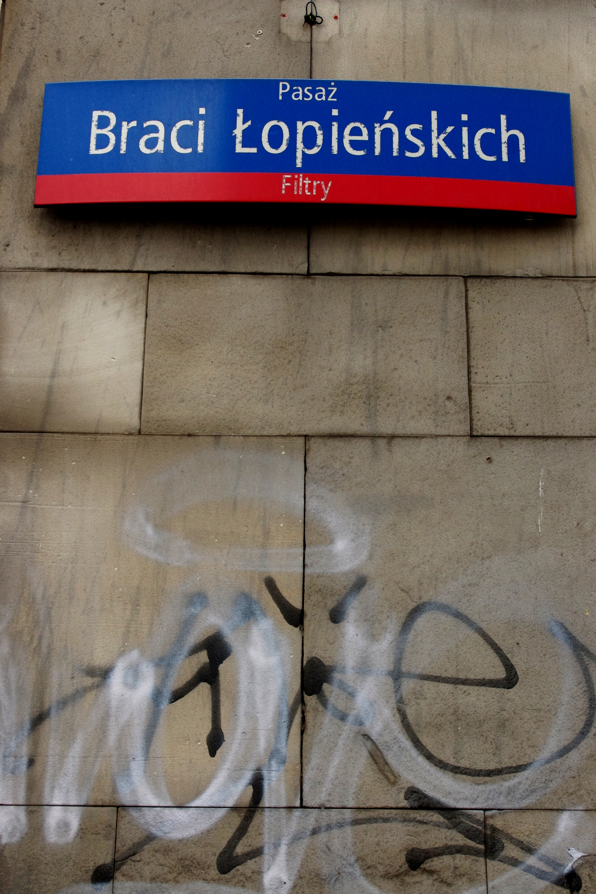 Pasaż Braci Łopieńskich na warszawskich Filtrach w dzielnicy Śródmieście, upamiętniający warszawski zakład brązowniczy Braci Łopieńskich